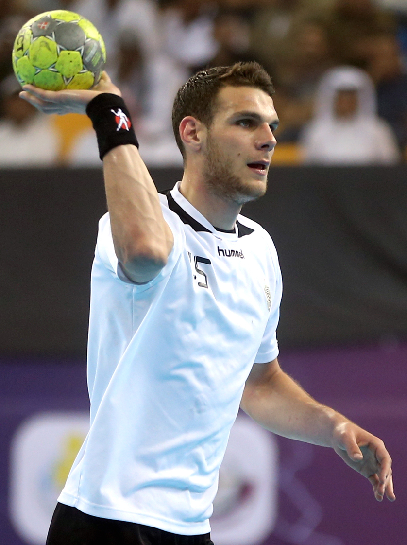 Borut Mačkovšek